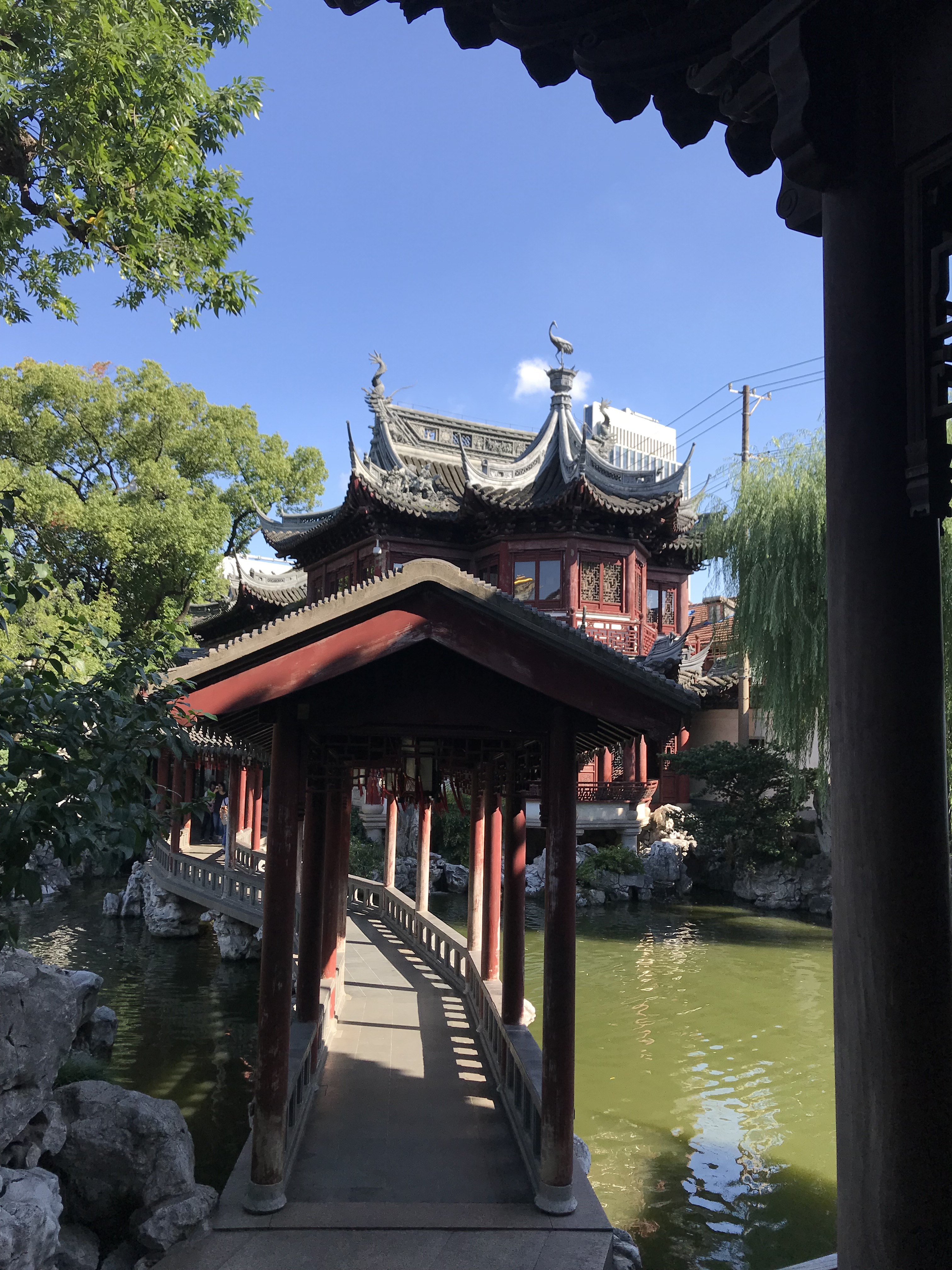 Xardín Yuyuan, setembro de 2018. Ponte.